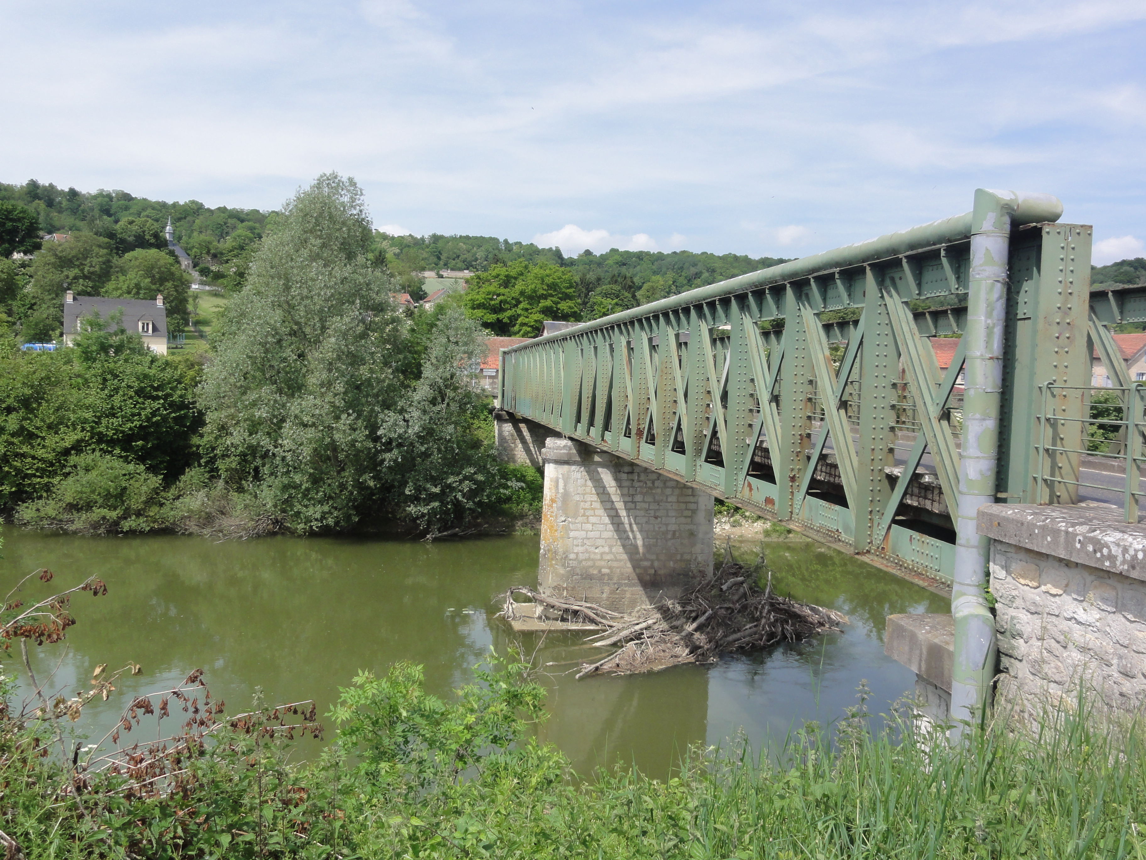 Chavonne (Aisne) vue du village et pont sur l'Aisne